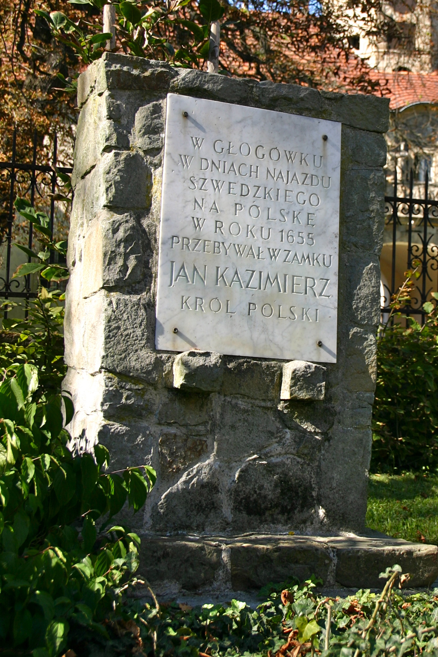 Pomnik Jana Kazimierza w Głogówku (dodatkowa nazwa w j. niem. Oberglogau) – miasto w Polsce położone na Górnym Śląsku, w województwie opolskim, w powiecie prudnickim.